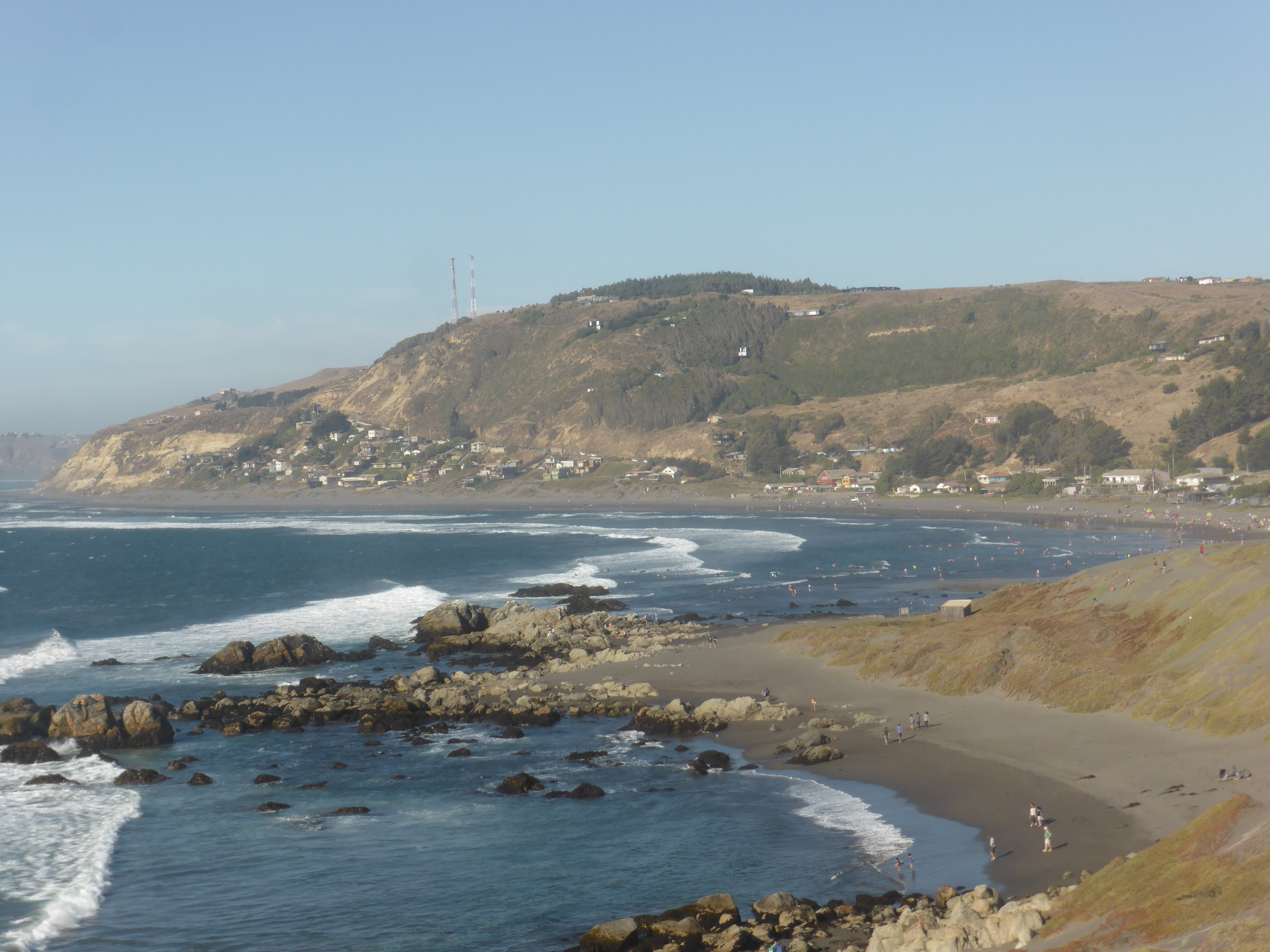 Matanzas es una localidad costera perteneciente a la comuna de Navidad. Aquí se cazaban lobos marinos (Otaria flavescens).